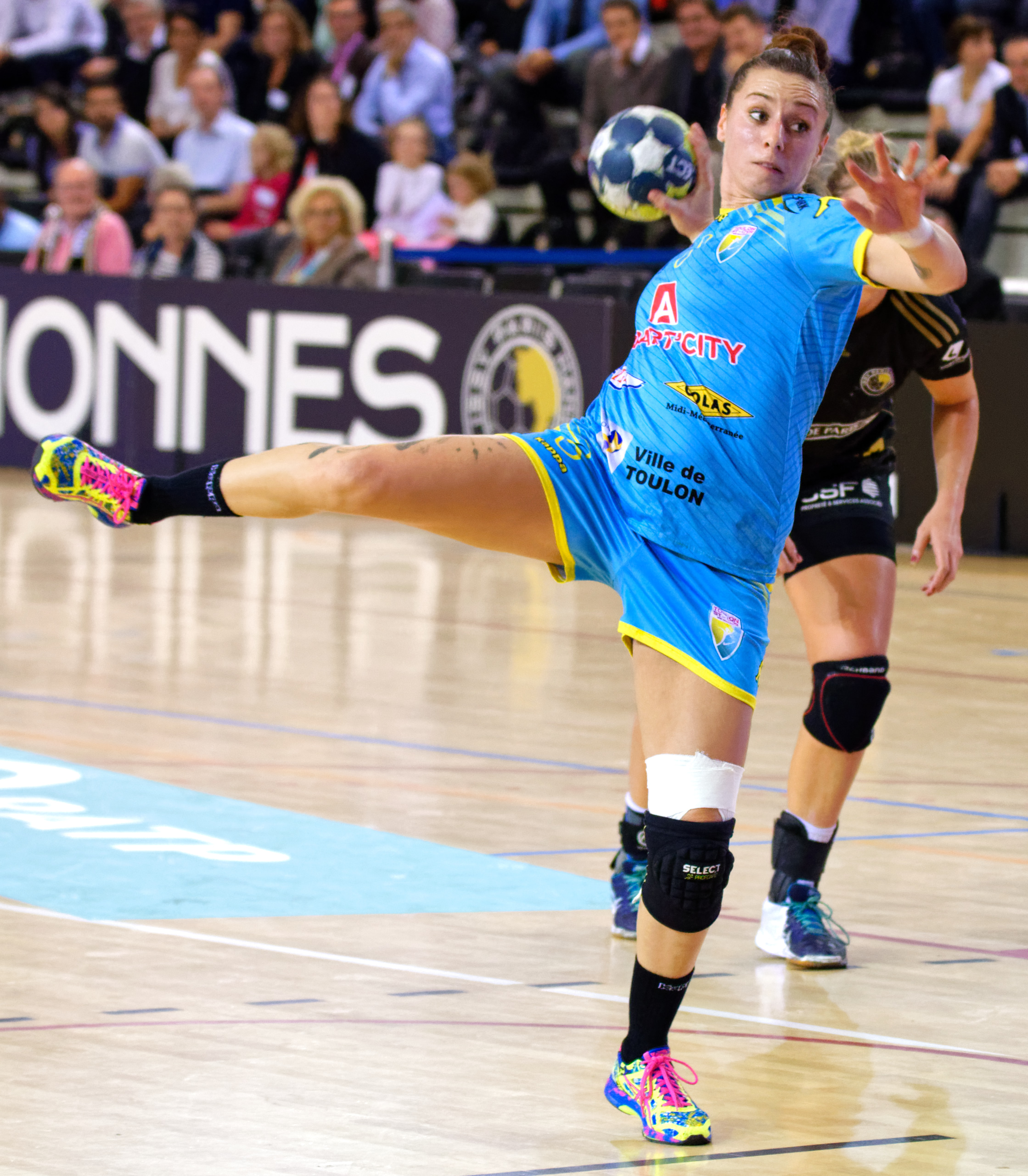 Rencontre de championnat entre Issy Paris Hand et toulon St Cyr. A Issy Les Moulineaux, le 30 septembre 2016.